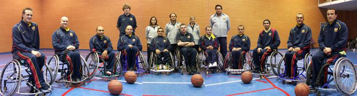 club esportiu guttmann